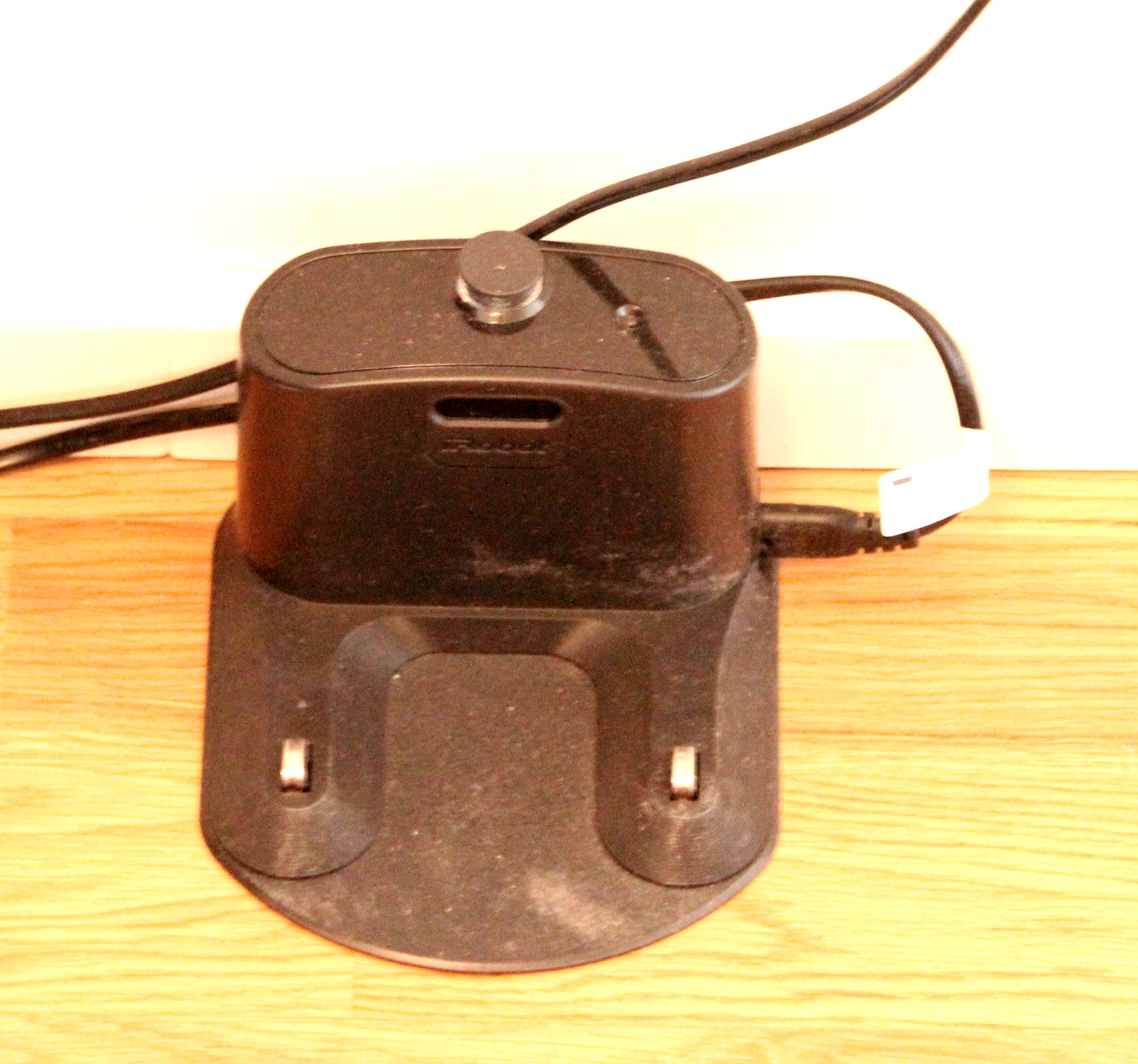 Bildinhalt: Die Dockingstation eines iRobot Roomba 785 Aufnahmeort: Frankfurt am Main, Deutschland